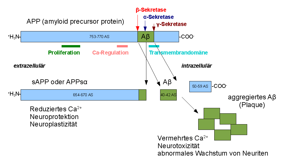 Spaltung des APP